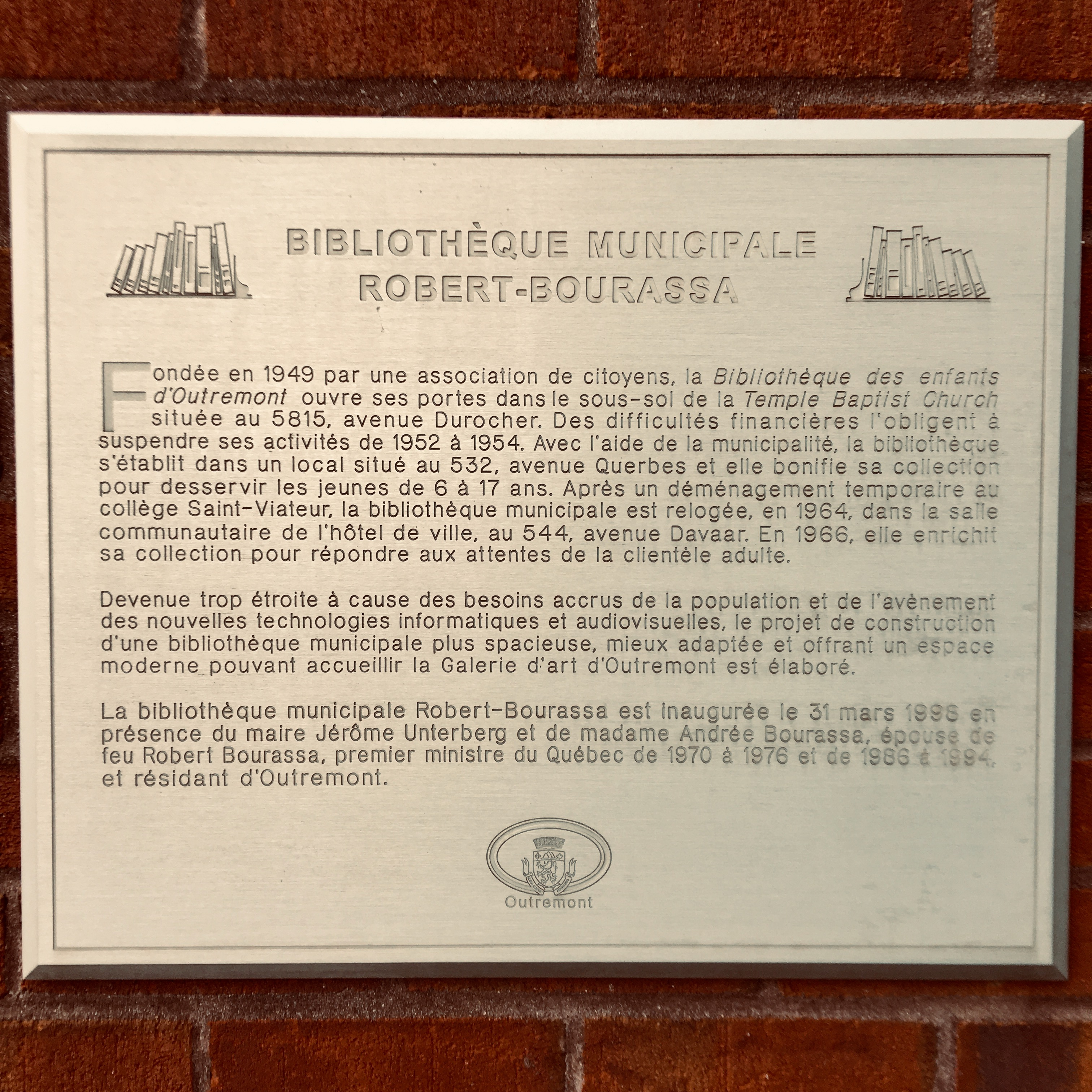 Plaque apposée sur le bâtiment de la bibliothèque Robert-Bourassa (Outremont, Québec) à l'occasion de son inauguration.